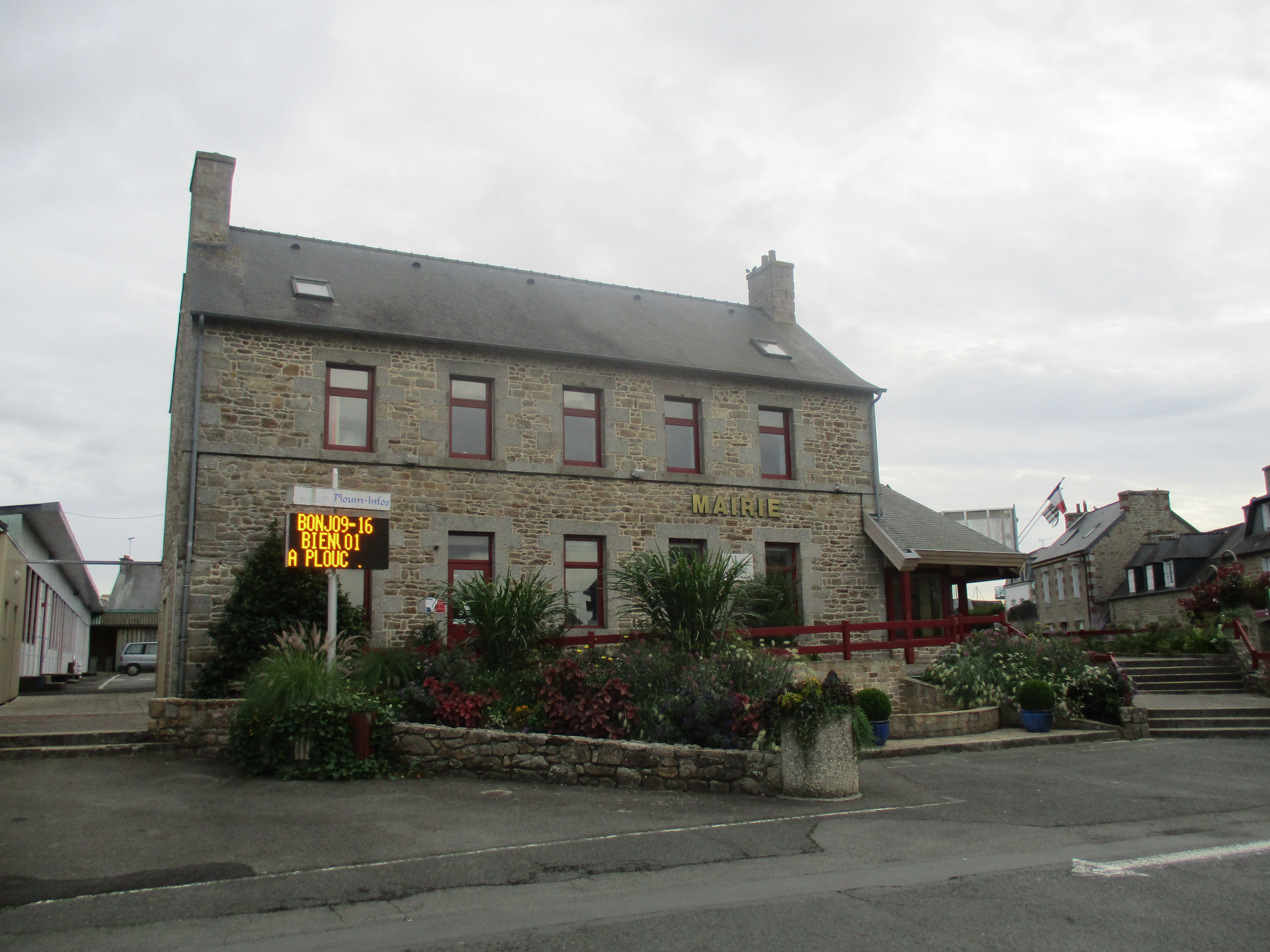 La mairie de Ploumagoar